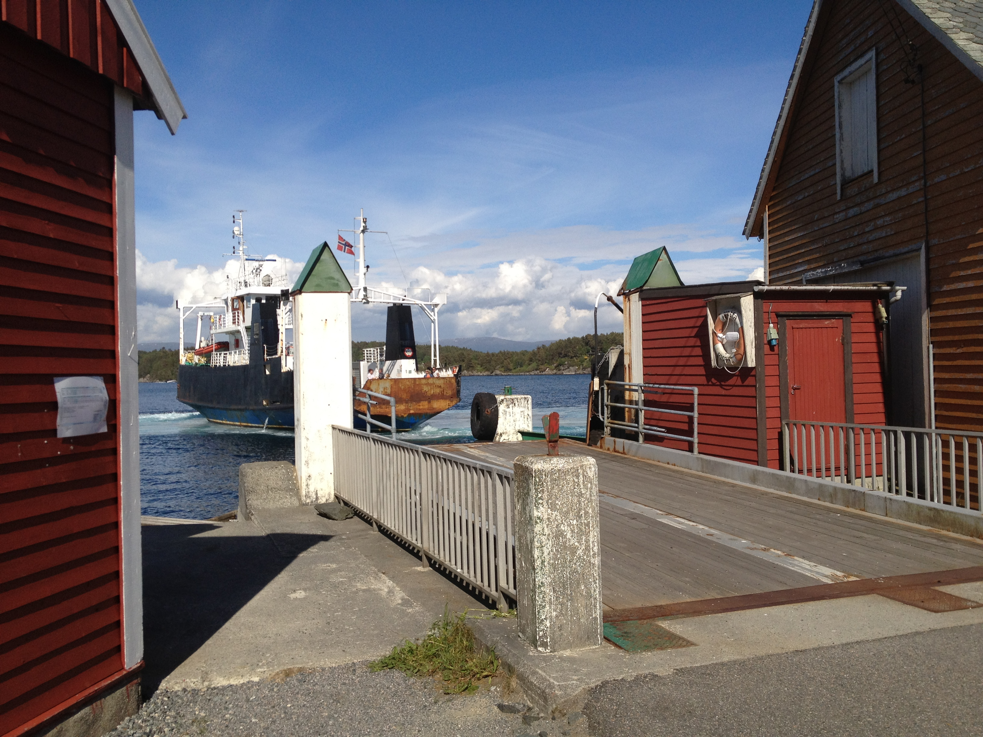 Bjelkarøy ferjekai på Bjelkarøy i Sund kommune.